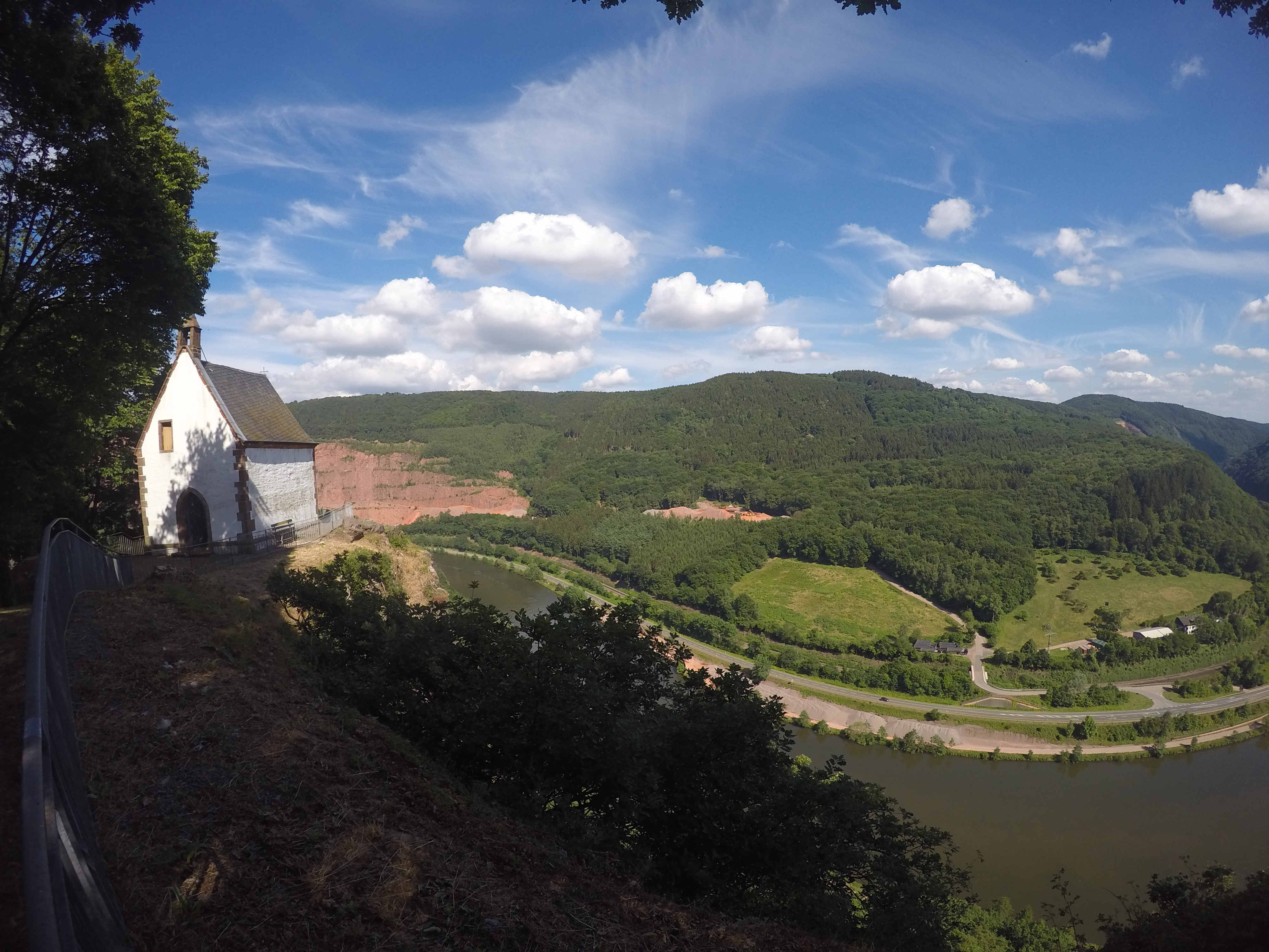 Michaelskapelle bei Taben-Rodt, hoch über der Saar auf einem Felsen positioniert, Ausgangspunkt für Wanderungen